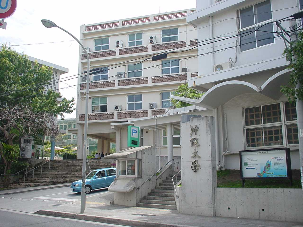 沖縄大学